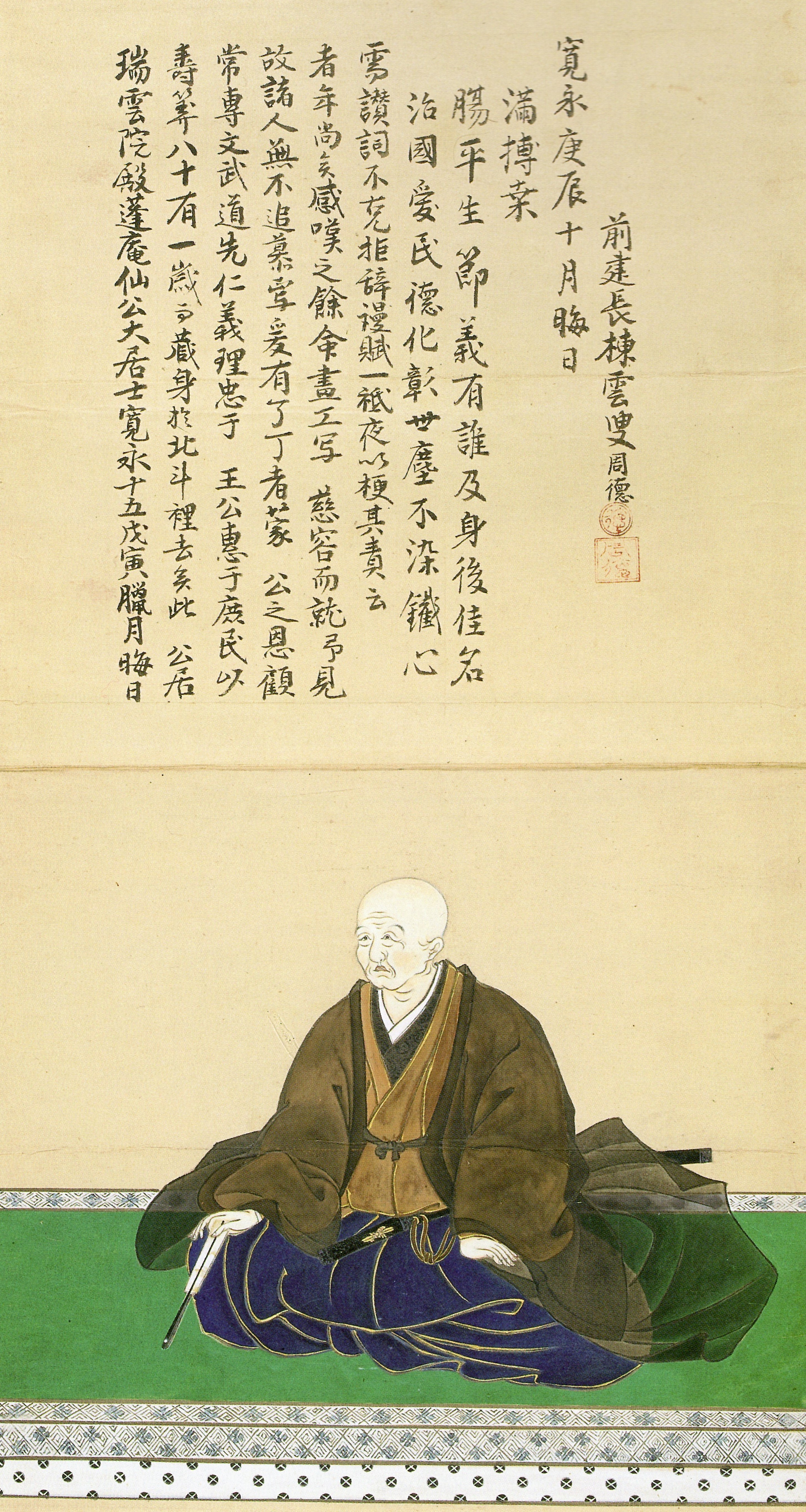 蜂須賀家政の肖像。